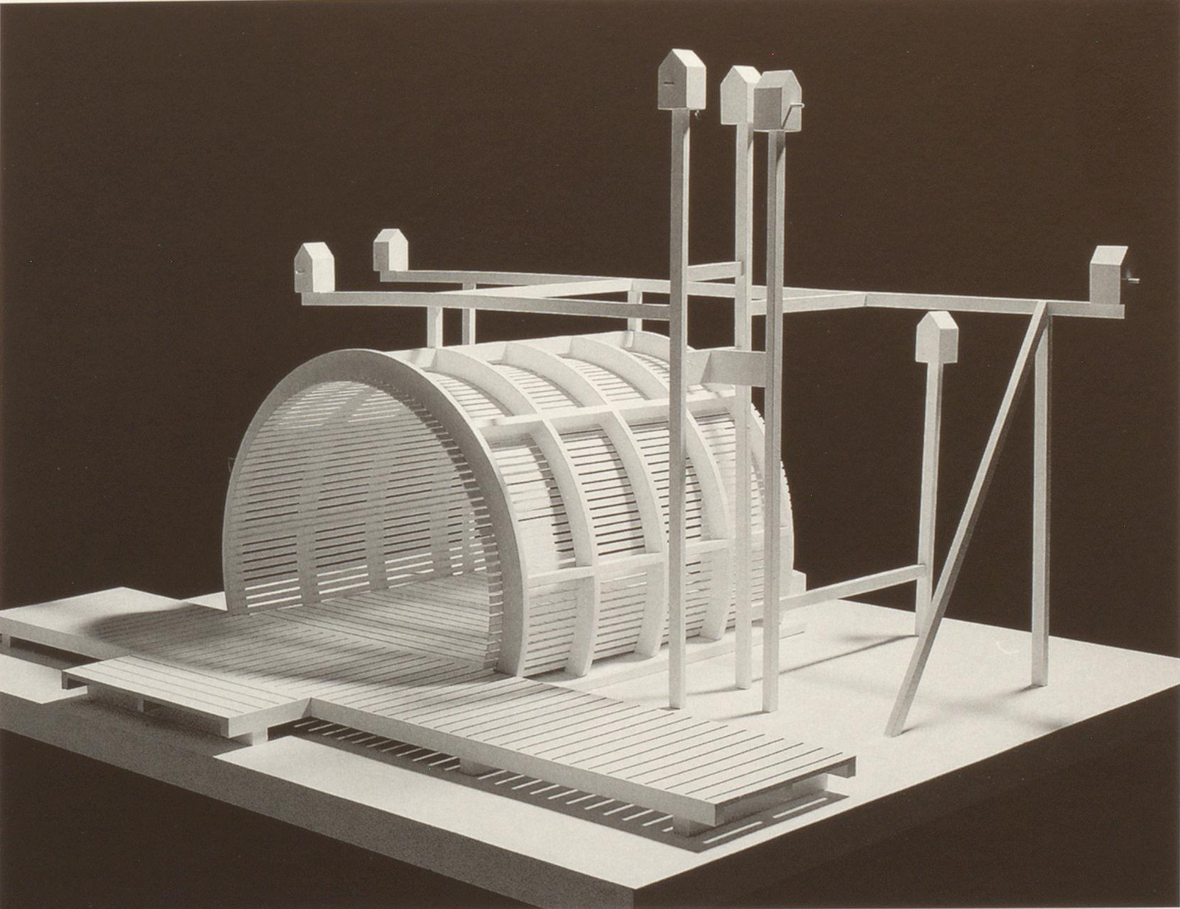 Laube der Kunststation Villa Moser von Hans Dieter Schaal in Stuttgart, Modell.